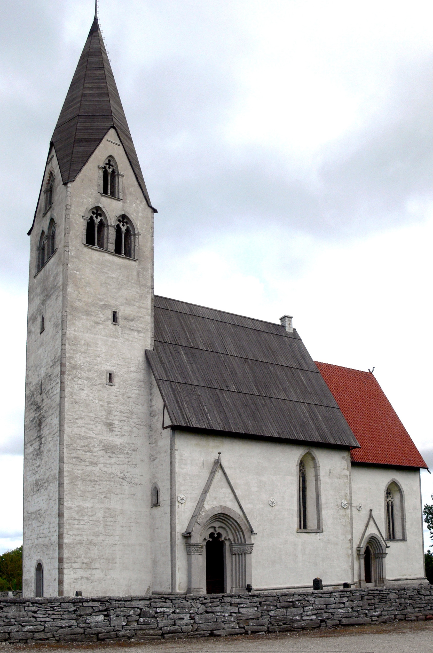 Ekeby kyrka auf Gotland. Außenansicht